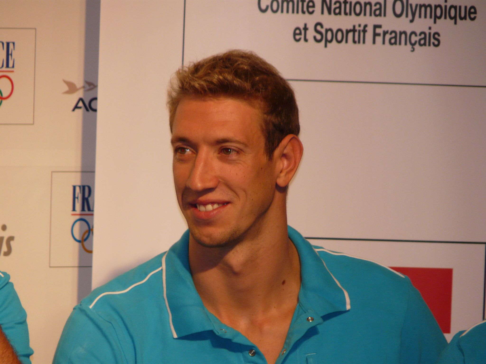 Le nageur Alain Bernard en août 2008